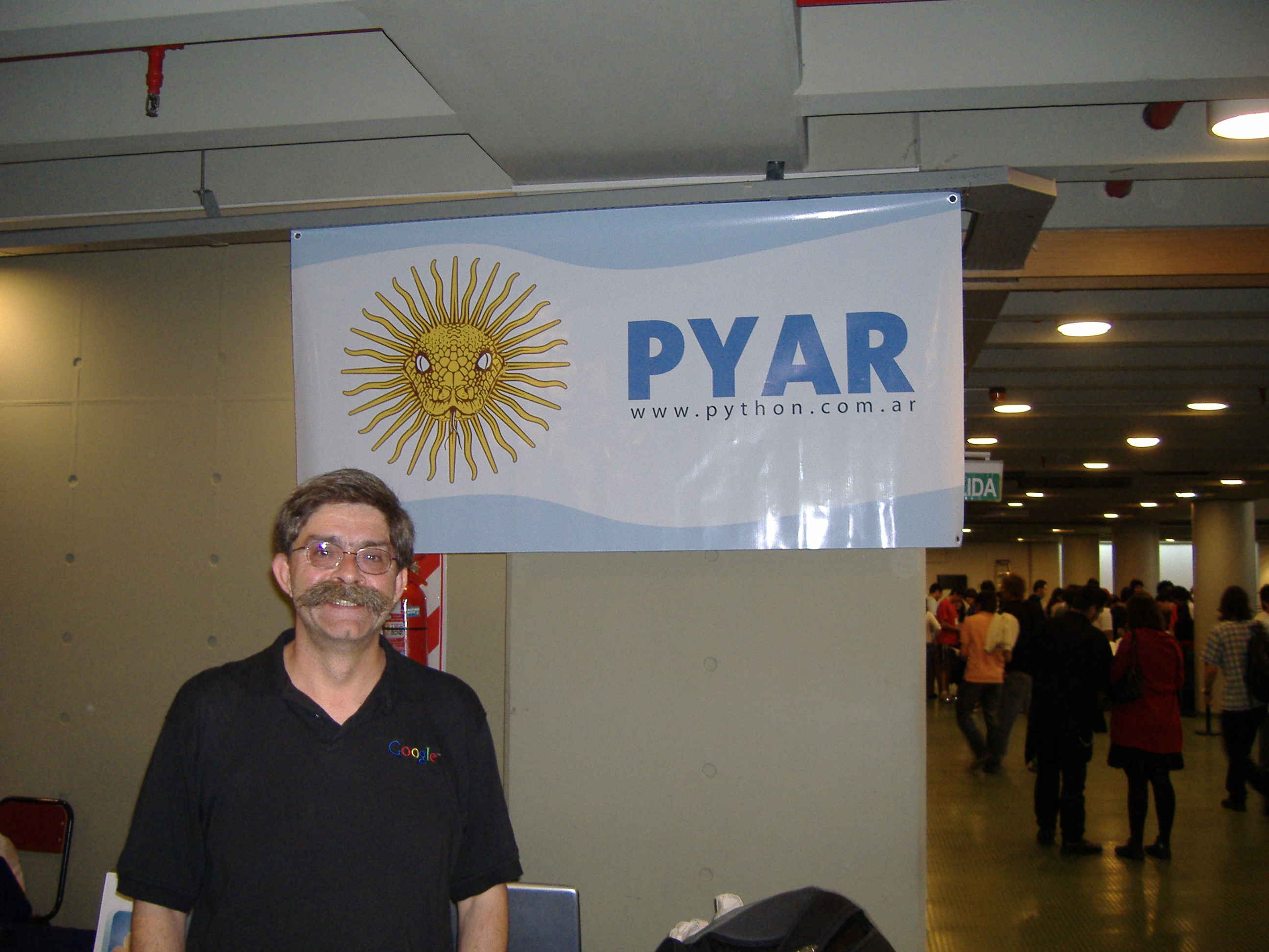 CaFeConf 2006, conferencias de software libre en la que Python Argentina tuvo un lugar destacado, no solo por el stand sino por traer invitado a Alex Martelli para la keynoteAlex Martelli en cafeconf 2006